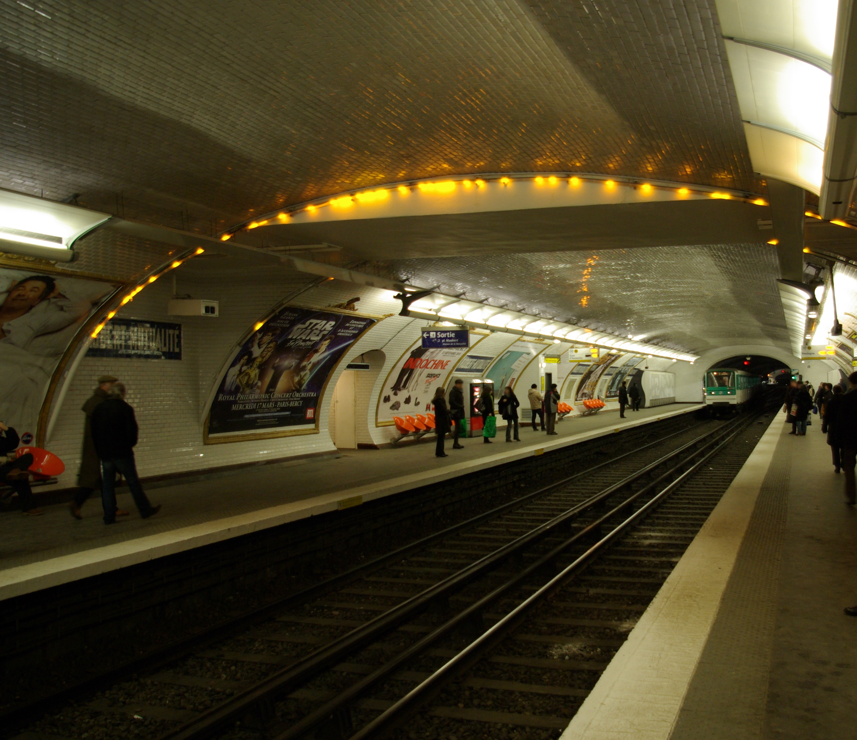 Station Maubert - Mutualité der Pariser Metro